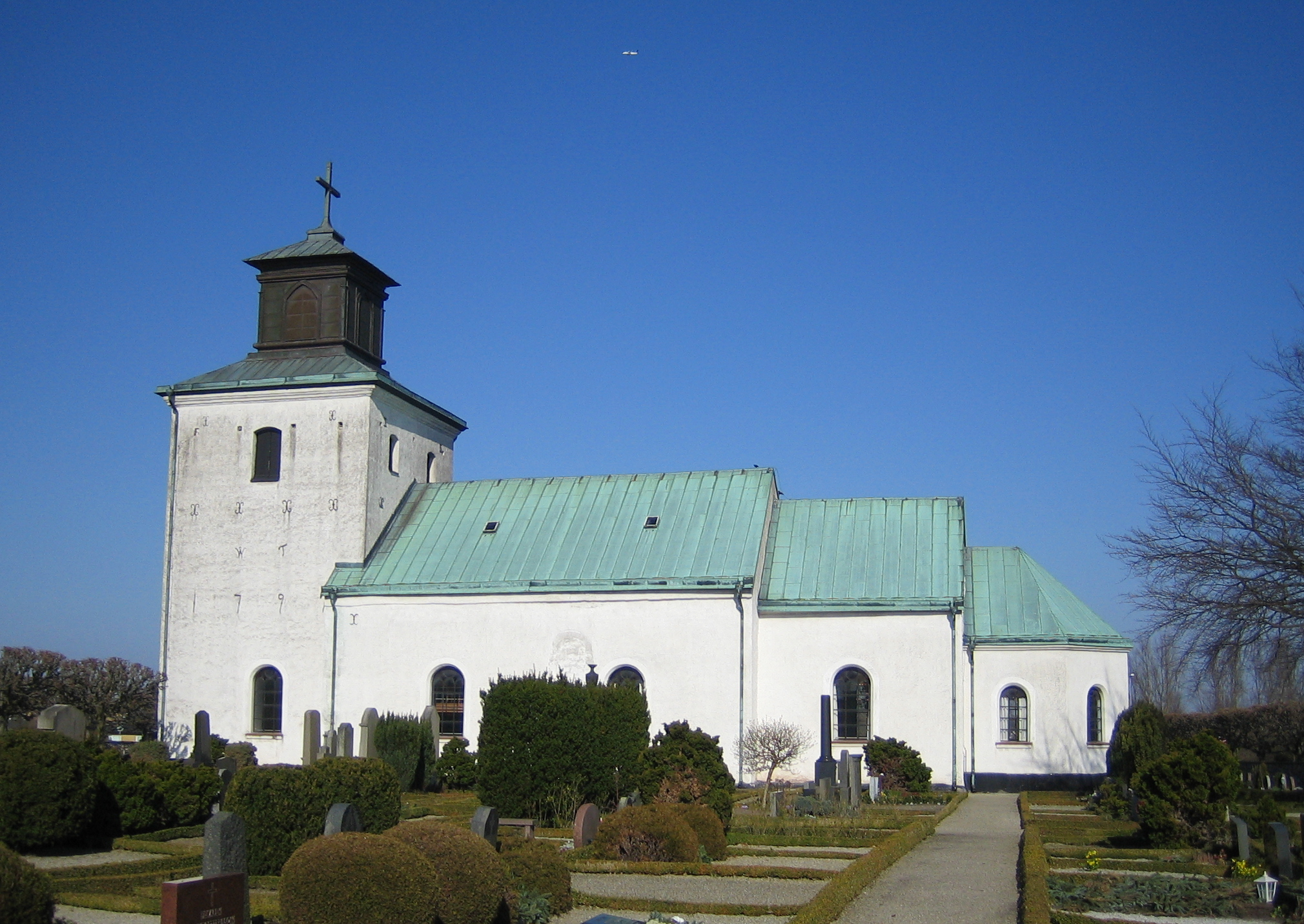 Löddeköpinge kyrka in Skåne, Sweden